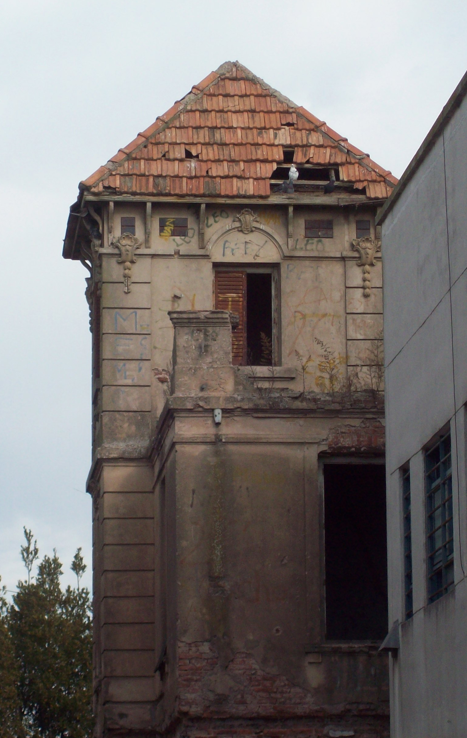 Foto de parte del Castillio del Abuelo (residencia de Silvio Dessy).